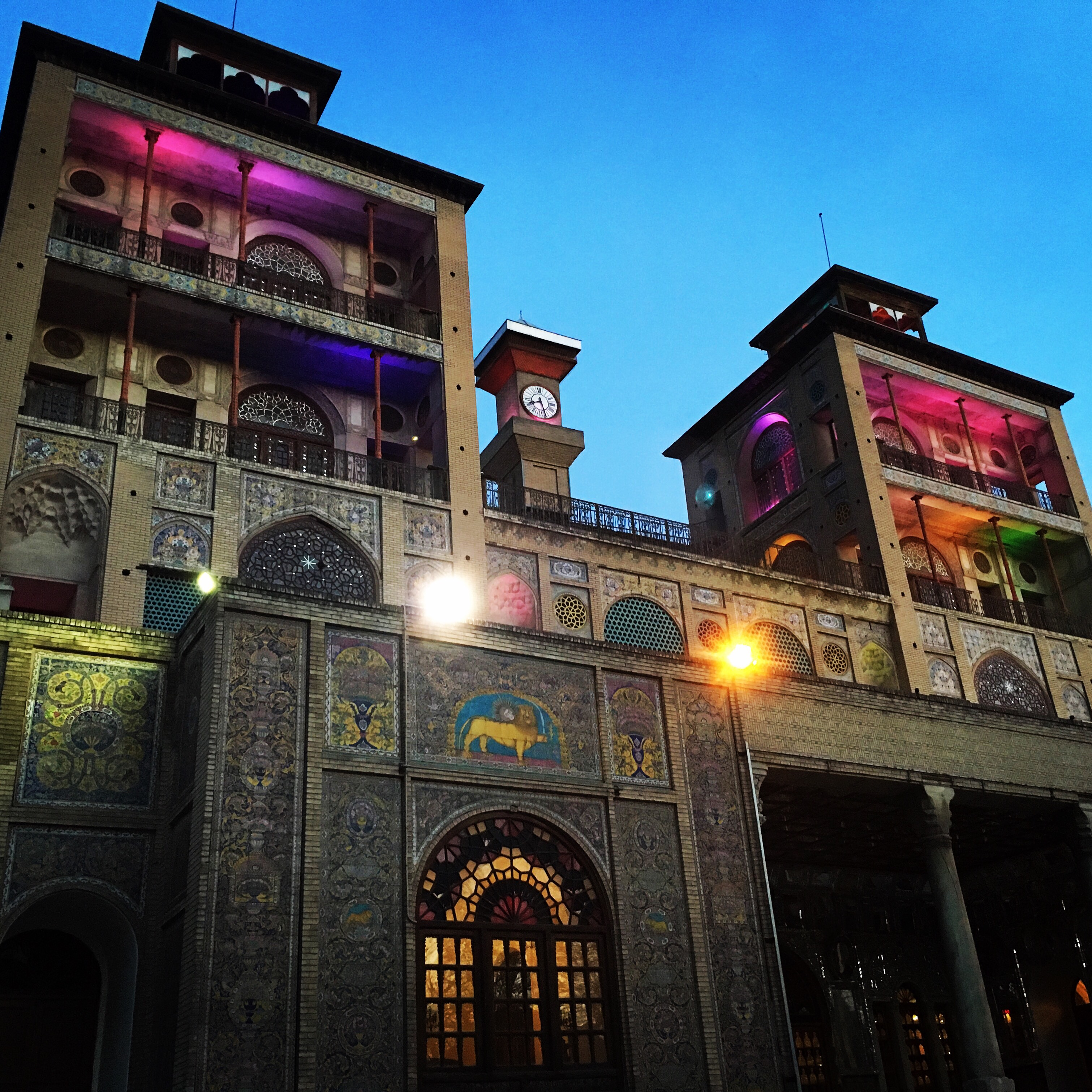 کاخ گلستان ابنیه سلطنتی مربوط و متصل به کاخ گلستان